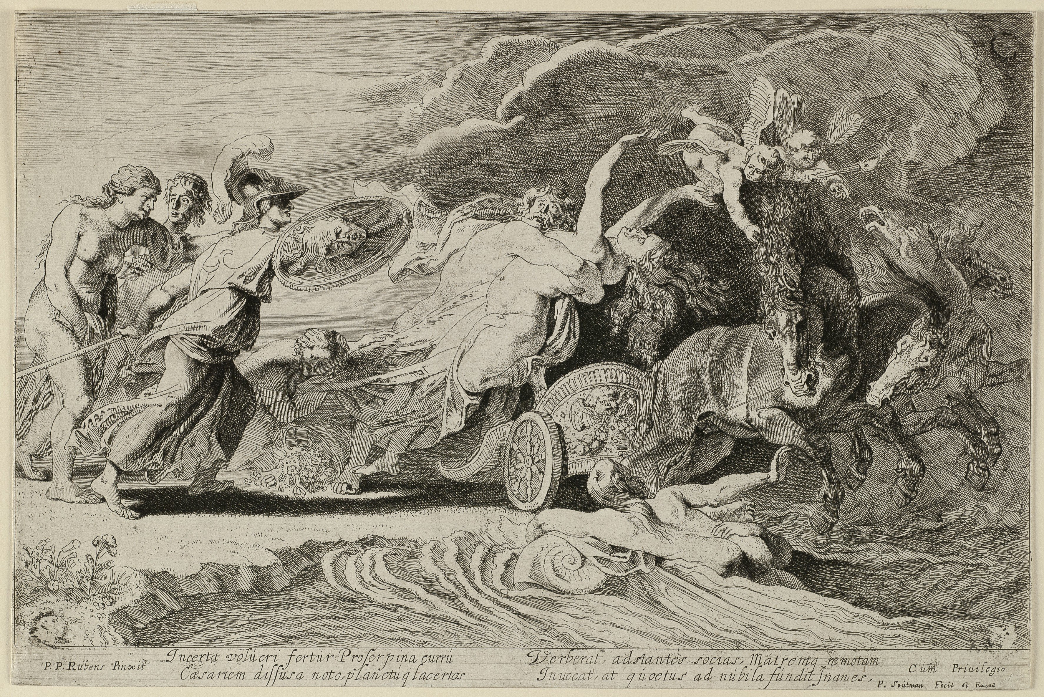 CollectieVoorhelm SchneevoogtInventarisnummerNL-HlmNHA_1477_53011788BeschrijvingDe roof van Proserpina.Pluto sleept Proserpina, de dochter van Ceres, in zijn wagen. Vanaf het strand kijken de nimfen toe. Minerva probeert de ontvoering te voorkomen. Onder de afbeelding vier versregels in het Latijn.Ets en gravure door Pieter Soutman naar schilderij van Peter Paul Rubens, gesigneerd.FotonummerNL-HlmNHA_1477_53011788DocumenttypeHistorieprenten, tekeningen en foto'sVervaardigerSoutman, Pieter (1593/1601-1657), Rubens, Peter Paul (1577-1640) UitgeverSoutman, Pieter (1593/1601-1657)Begindatum1616Einddatum1657TechniekGrafiek Drukwerk Trefwoordenmythologische figuren, mythologische goden en godinnen, mythologische goden en godinnen LiteratuurHollstein Dutch, Pieter Soutman, 14